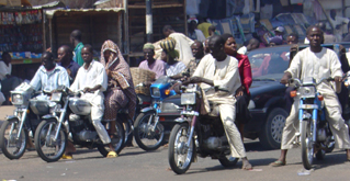 Okadas in Kano, Nigeria